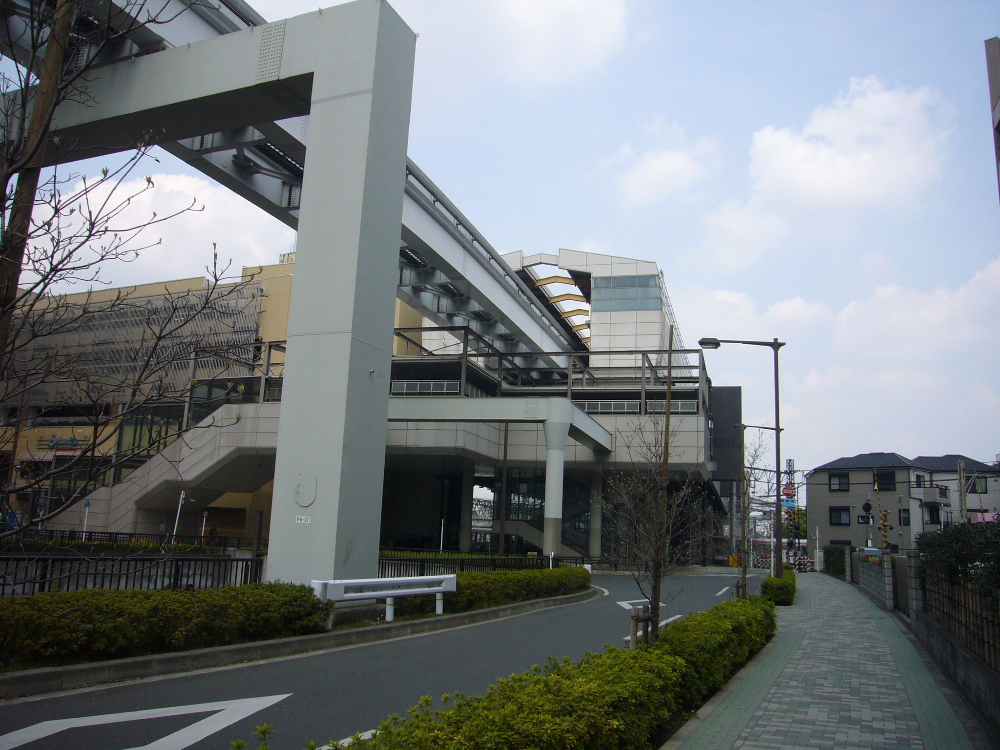 Tama Toshi Monorail Takahatafudo station